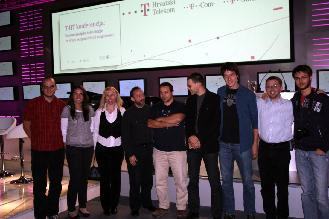 Jimmy Wales i hrvatski Wikipedisti